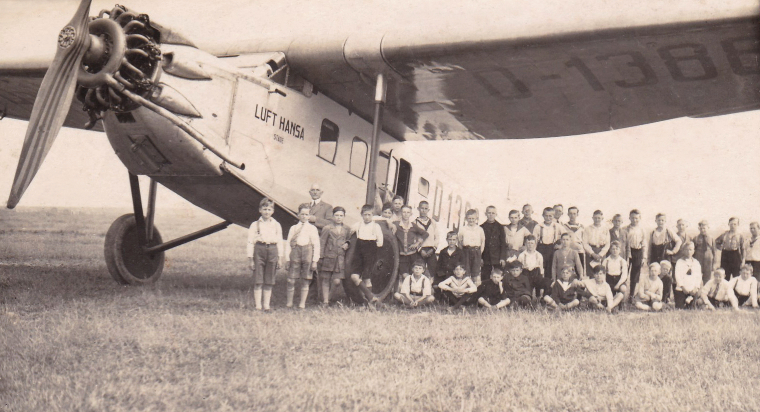 Focke-Wulf A 17 „Stade“ der Lufthansa (D-1388) auf dem Flugplatz Weddewarden